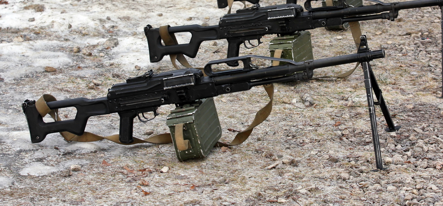 Пулемёт «Печенег»